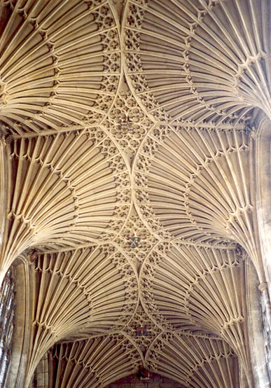 Voûtes en éventail dans l'abbaye de Bath Source Shakti Statut Shakti